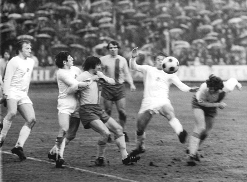 ADN-ZB-Kluge-23-2-74-ma-Leipzig: Fußball-Oberliga, 1. FC Lok Leipzig - Sachsenring Zwickau 2:0 - Dieser Kopfball von Wolfram Löwe (Leipzig-rechts) geht am Zwickauer Tor vorbei. In der 62. Spielminute kam dann der Leipziger aber zum Torerfolg. Weiter von rechts: Reichelt (Zwickau), Frenzel, Lisiewicz (beide Leipzig), Schubert und Henschel (beide Zwickau).